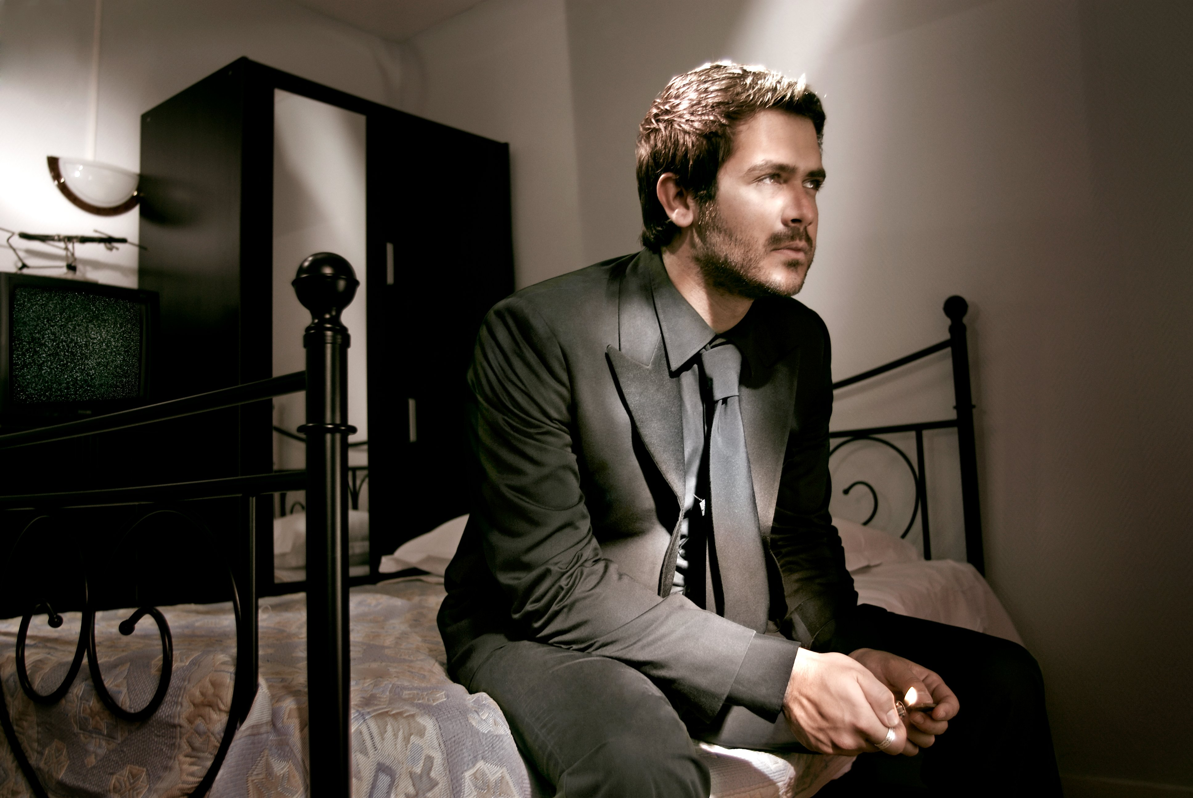 Seuil (Pressefoto)